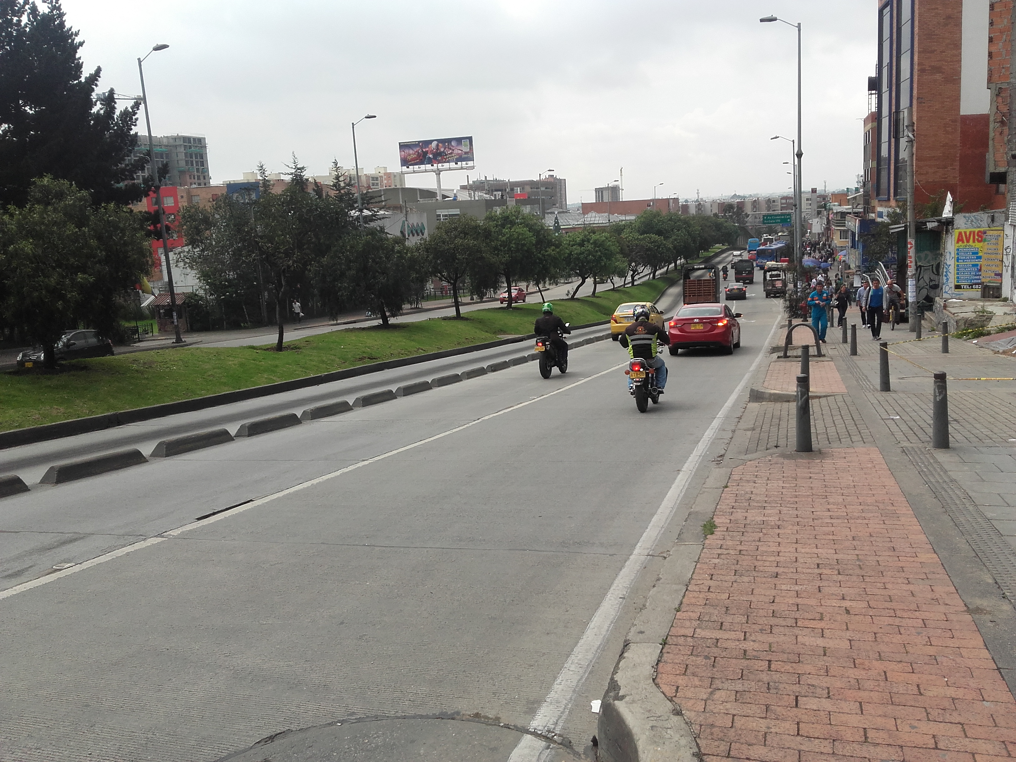 fjfjfjfjfj